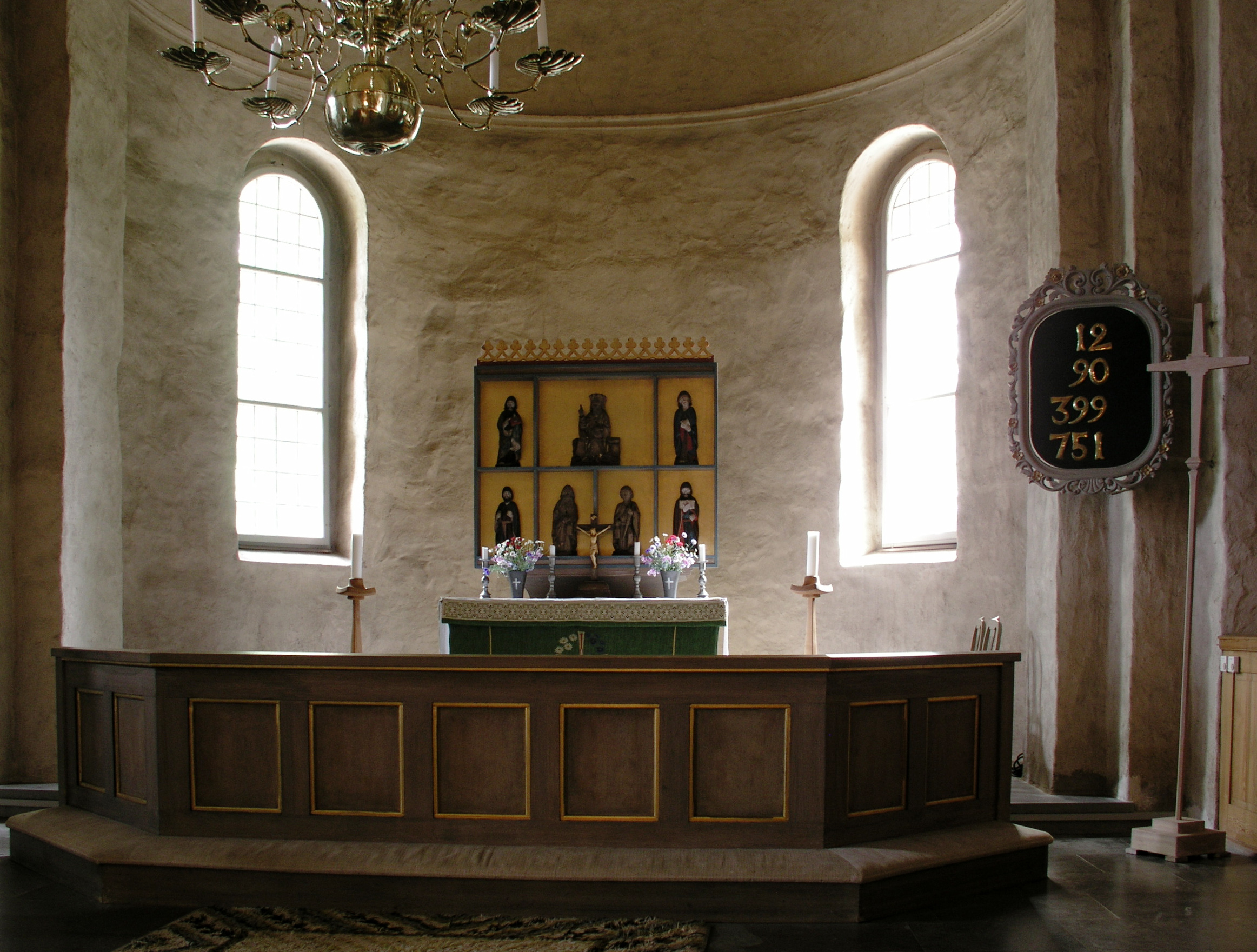 Heda kyrka, Diocese of Linköping, Ödeshögs kommun. Altar.